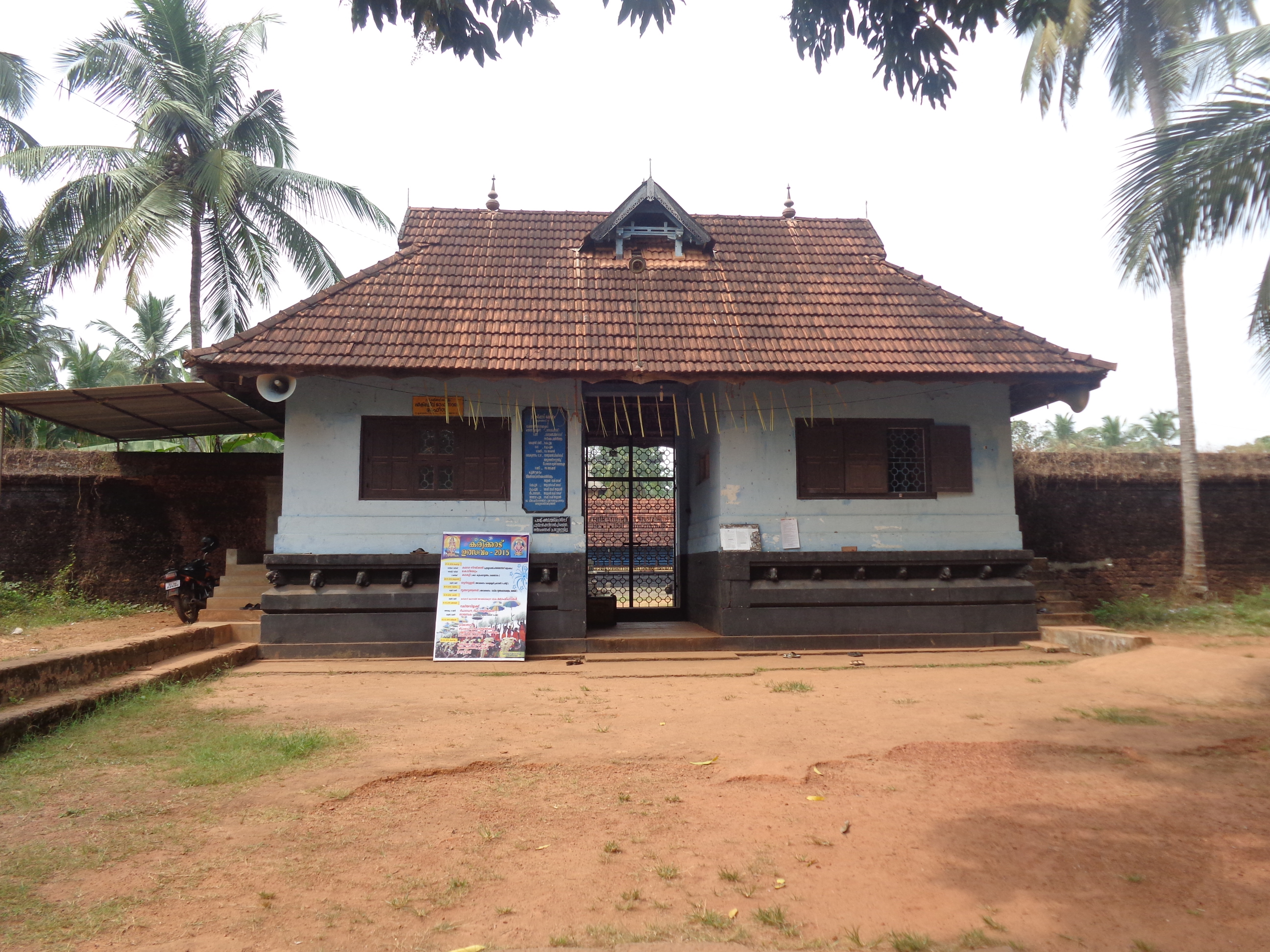 Karikkkad subrahmanya temple- gopuram